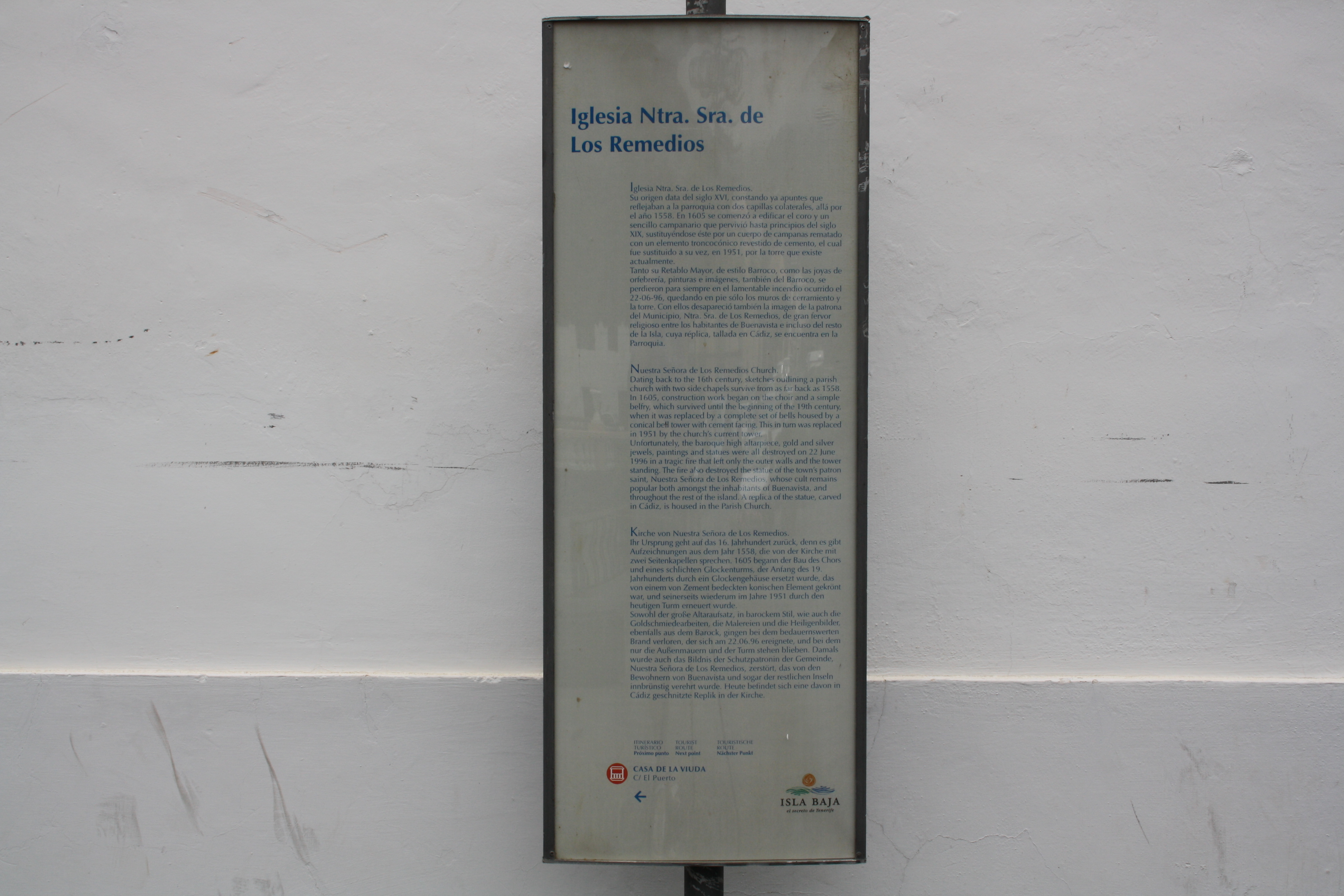 Kirche Iglesia Nuestra Señora de Los Remedios in Buenavista del Norte auf Teneriffa. Infotafel neben Seiteneingang